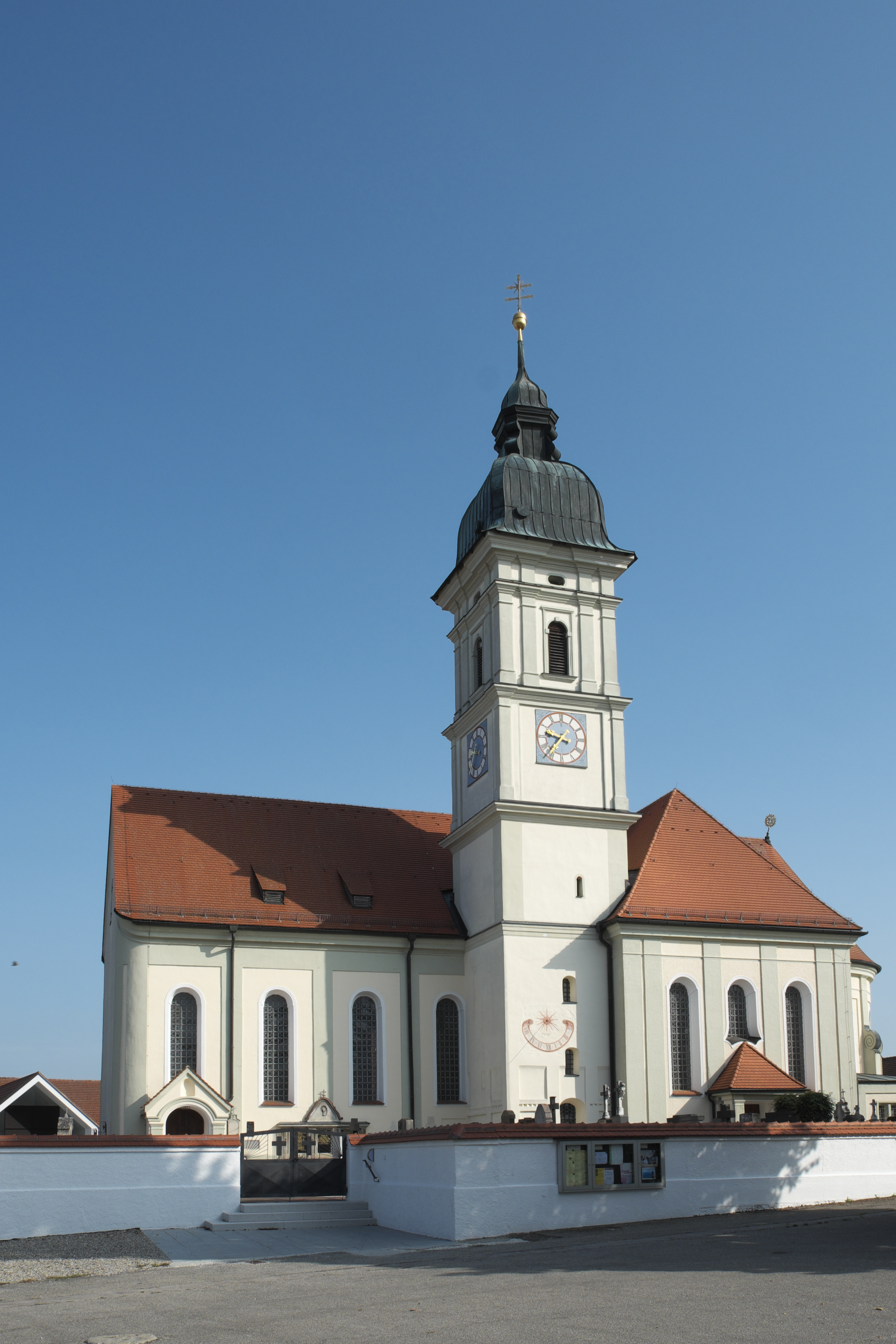 Katholische Pfarrkirche St. Michael in Reichenkirchen (Fraunberg) im Landkreis Erding (Bayern/Deutschland)